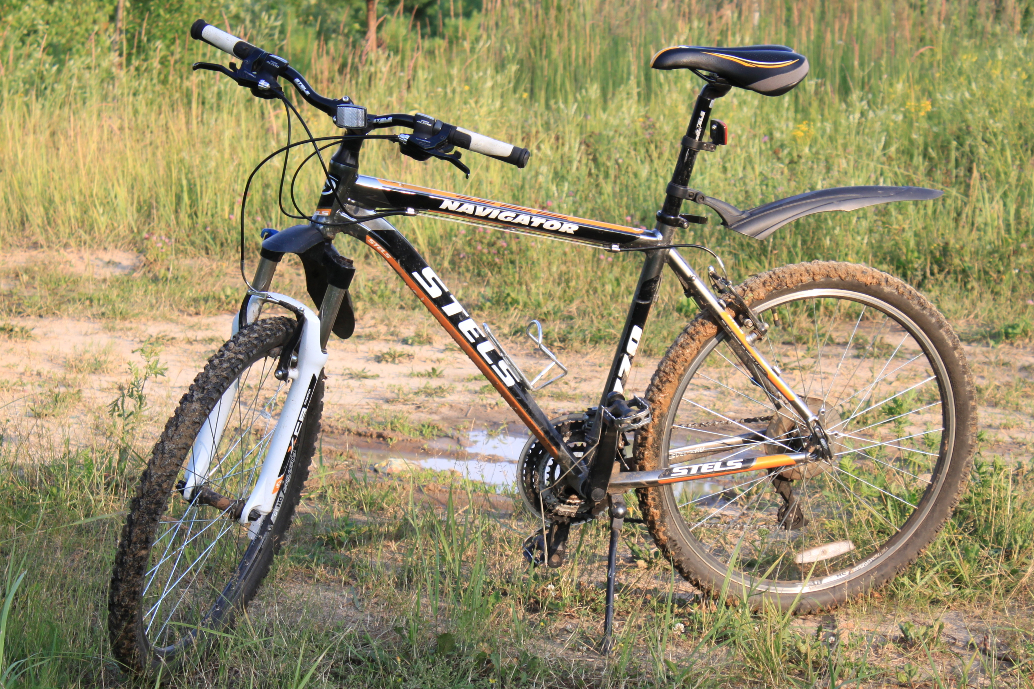 Велосипед, общий вид